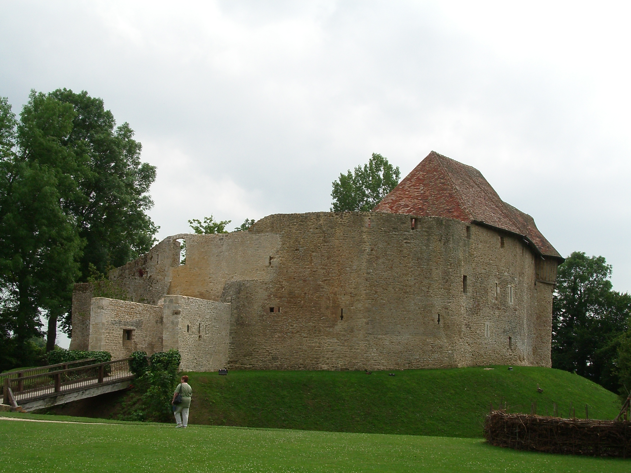 Chateau_crèvecoeur.JPG